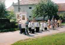 Popis: Procesia dedinou Zdroj: Fotodokumentácia k obci Dátum: 24.01.2006 Autor: Stanislav Rajňák Povolenie: PD Iné verzie tohto súboru: Nie